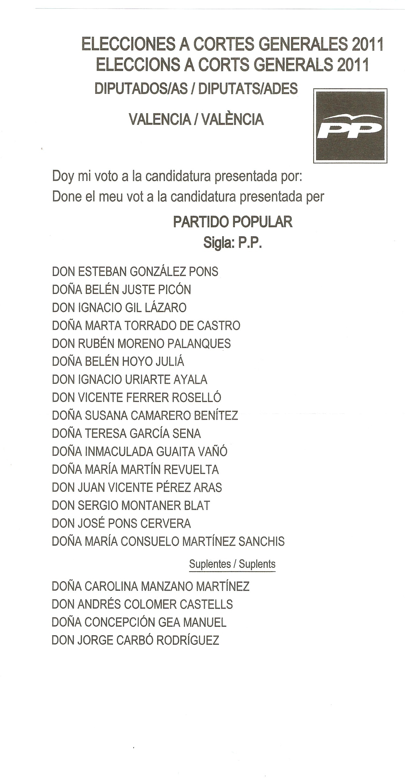 Papeleta del Partido Popular por Valencia al Congreso, elecciones de 2011